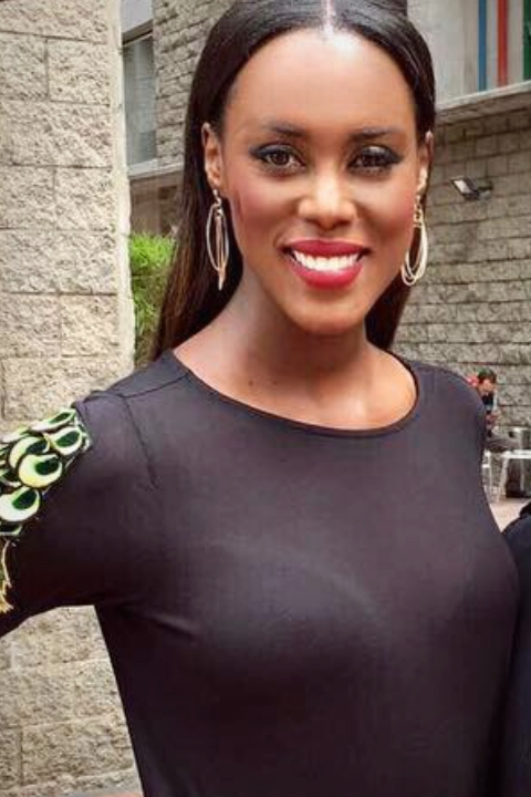 La periodista y modelo Claudia Lozano en una entrevista en 2018.